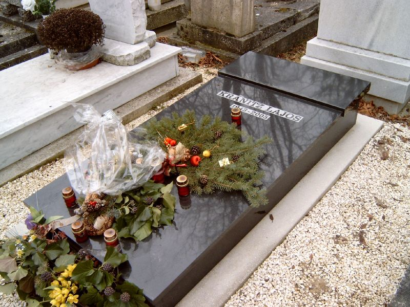 Kránitz Lajos actor_8417.jpg